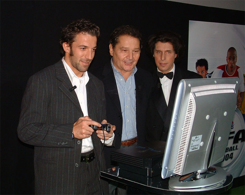 Alessandro Del Piero, Bruno Longhi y Raul Cremona durante la presentación italiana del videojuego FIFA Football 2004.